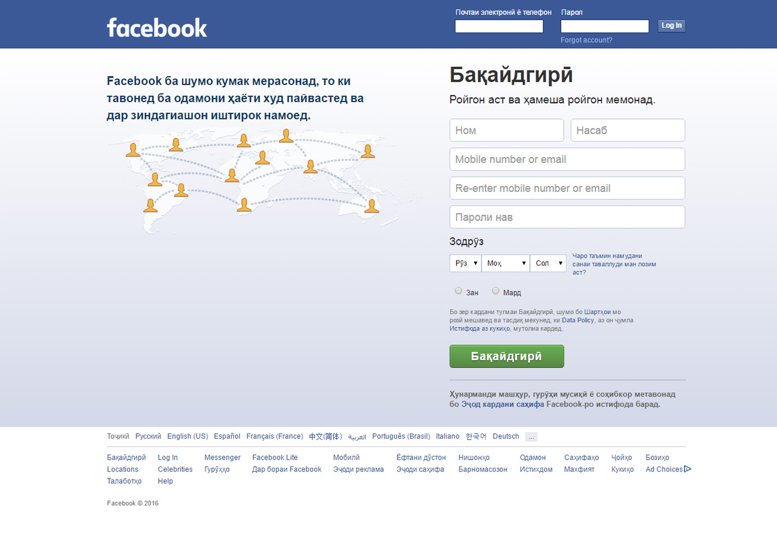 Тоҷикӣ: Саҳифаи аввали Фейсбук (тоҷикӣ) соли 2016